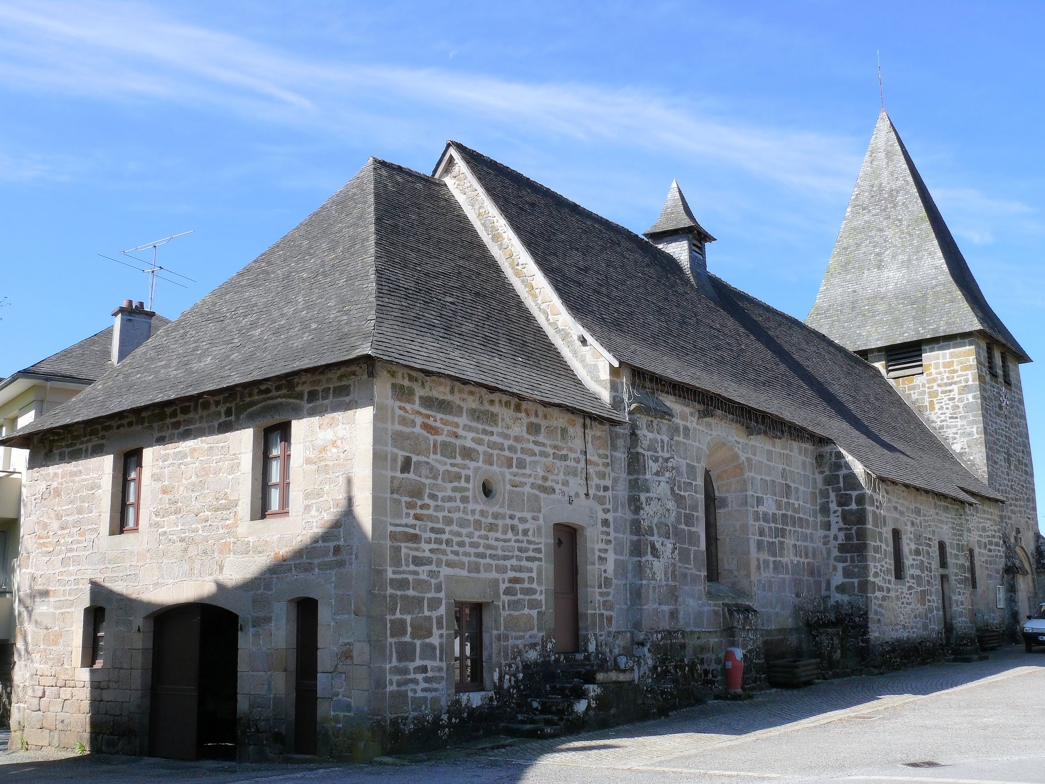 Saint-Augustin (Corrèze) - Eglise Saint-Augustin